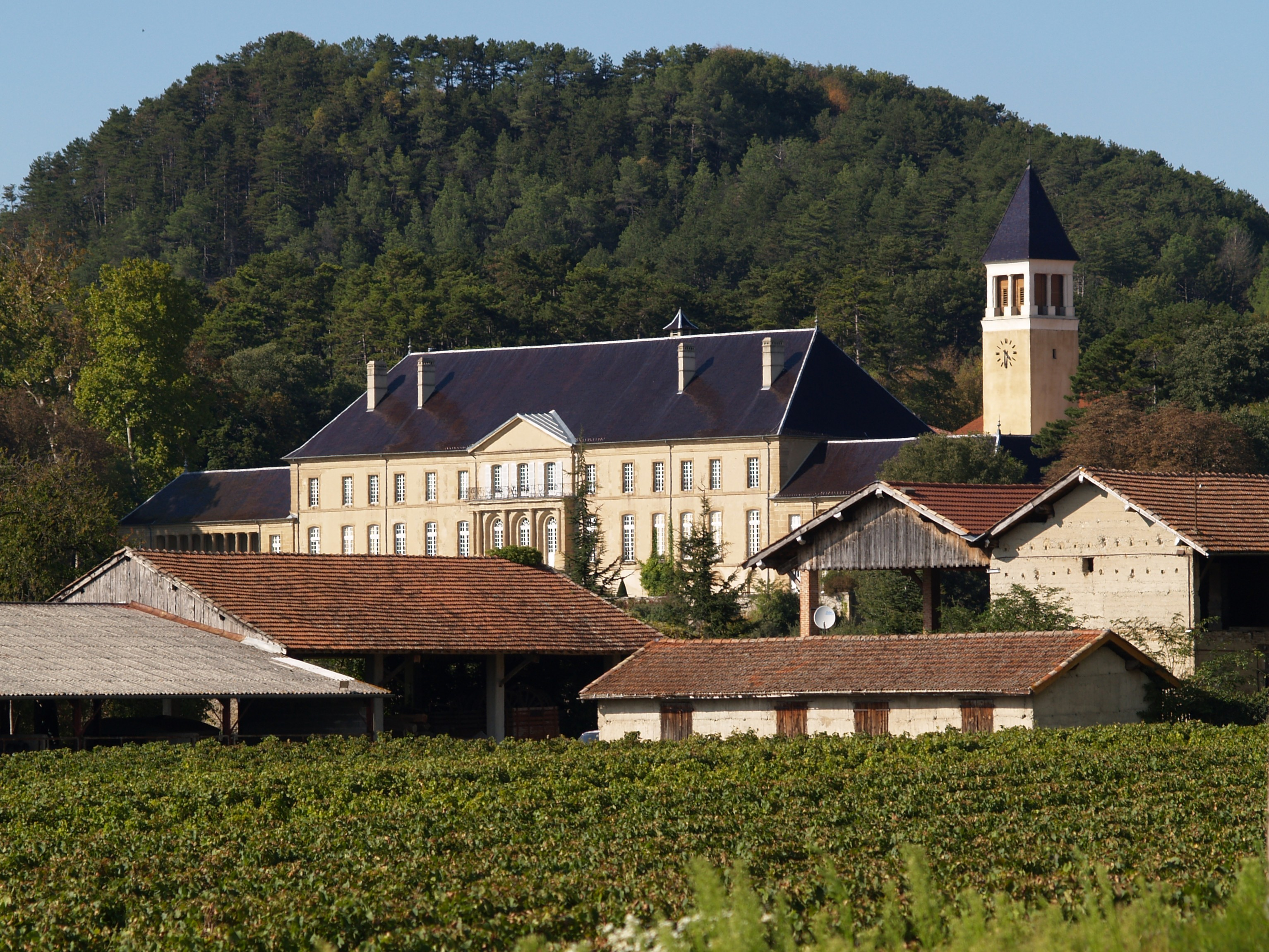 abbaye bénédictine de Triors en France. Construction fin XXe siècle, style roman-provençal, à partir d'un château XVIIIe.